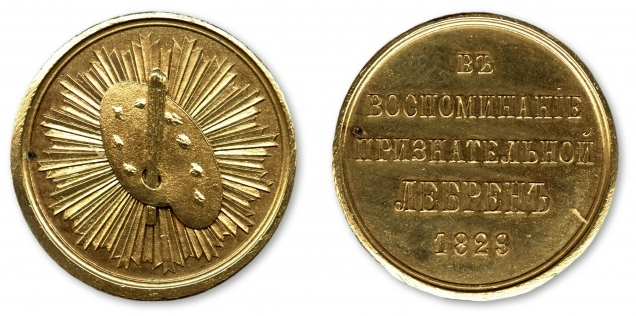 Премиальная золотая медаль, учреждённая французской художницей Элизабет Виже-Лебрен, которой награждался один из учеников Санкт-Петербургской Императорской Академии художеств по классу живописи.